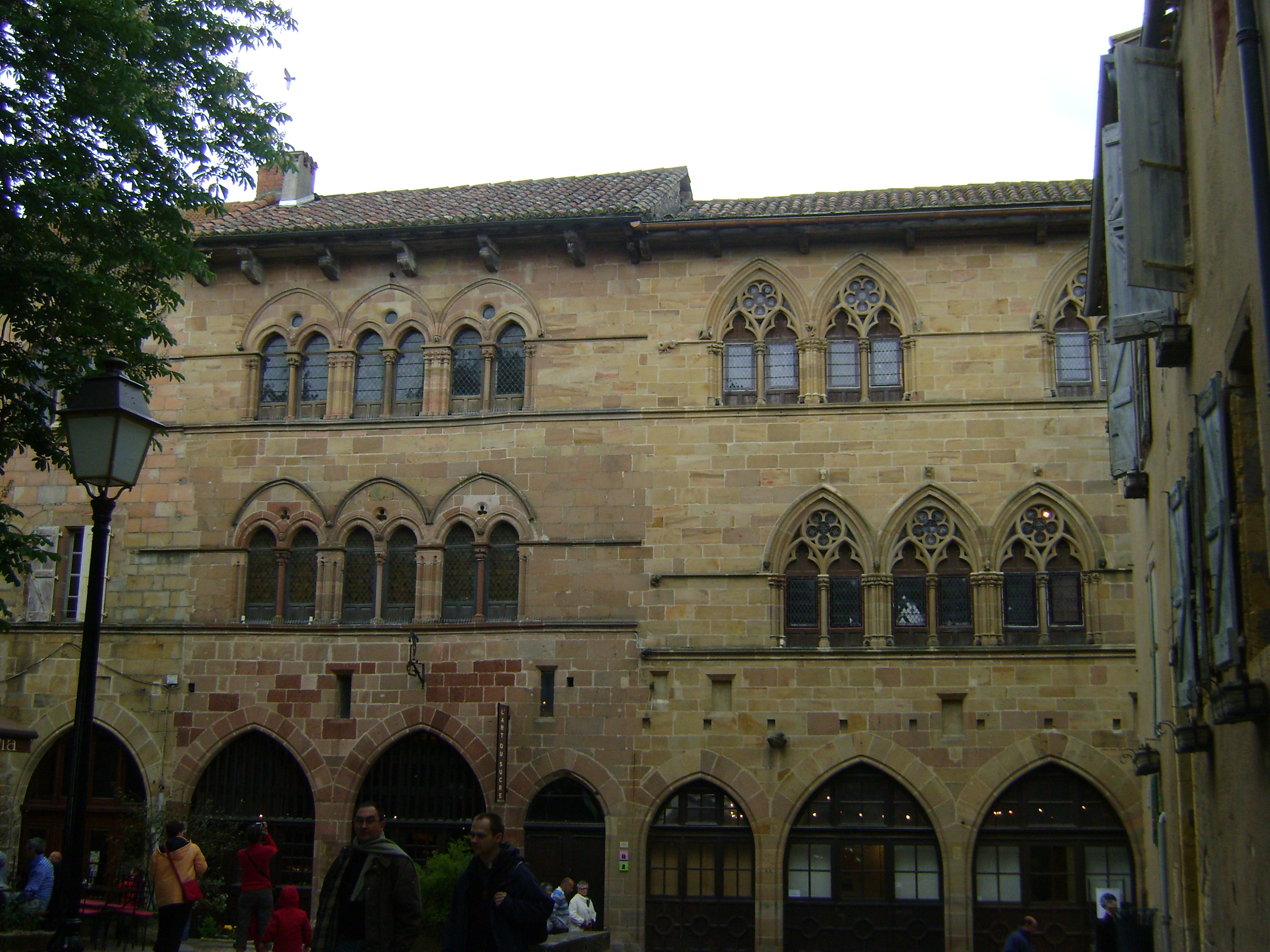 La maison du grand fauconnier, Cordes-sur-Ciel, Tarn.